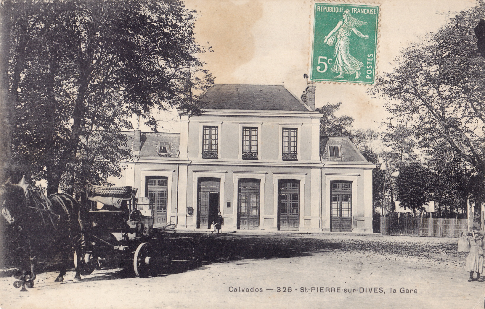 Carte postale ancienne sans mention d'éditeur, n°328 : ST.-PIERRE-SUR-DIVES - La Gare